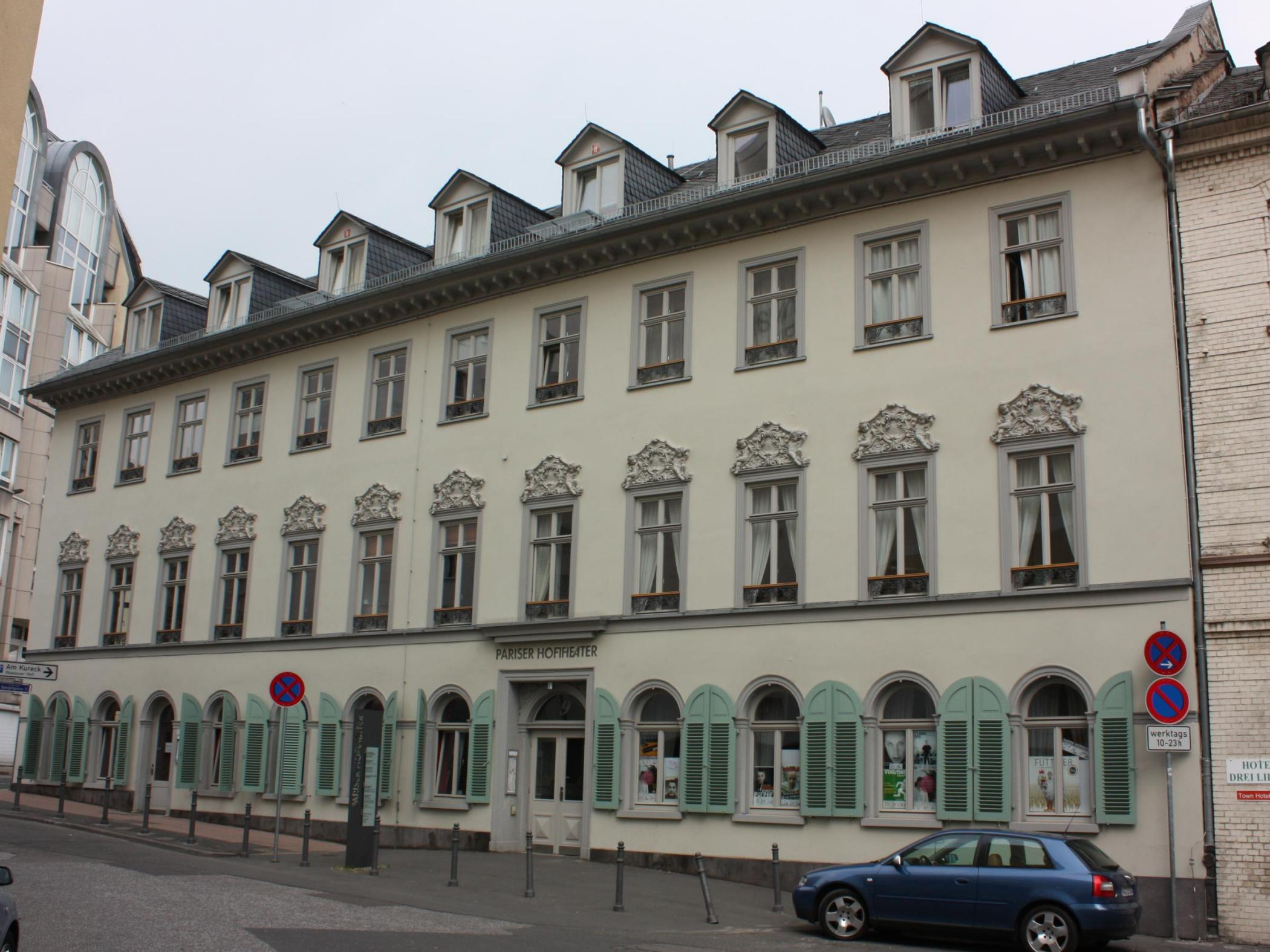 Spiegelgasse 9 in Wiesbaden, Hessen, Deutschland. Das Gebäude ist das ehemalige jüdische Badehotel Zum Rebhuhn. Heute beherbergt es das Pariser Hoftheater und das Aktive Museum Spiegelgasse.